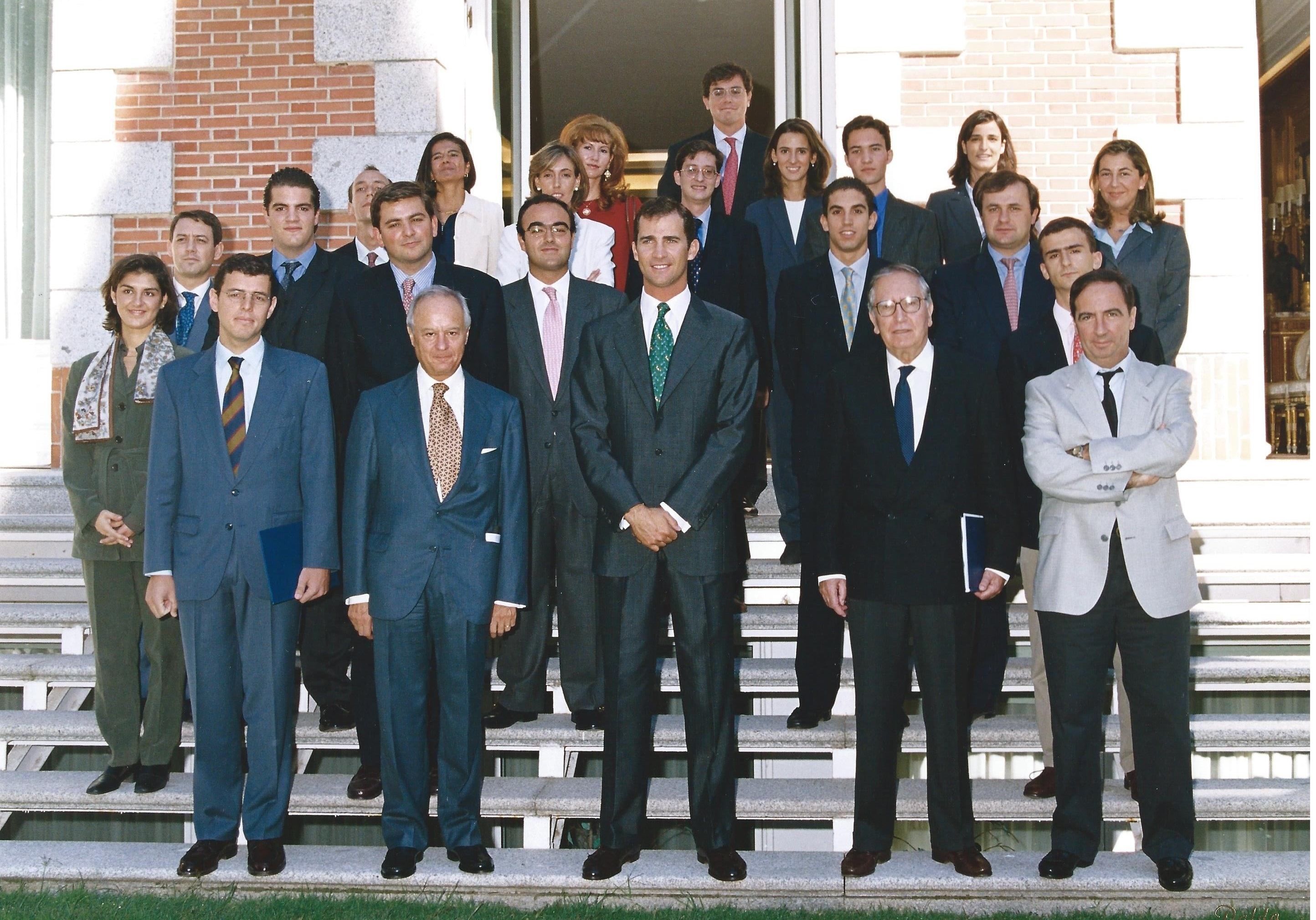 Fernando Reinoso Suárez con SSMM Felipe VI (Entonces Príncipe Felipe)